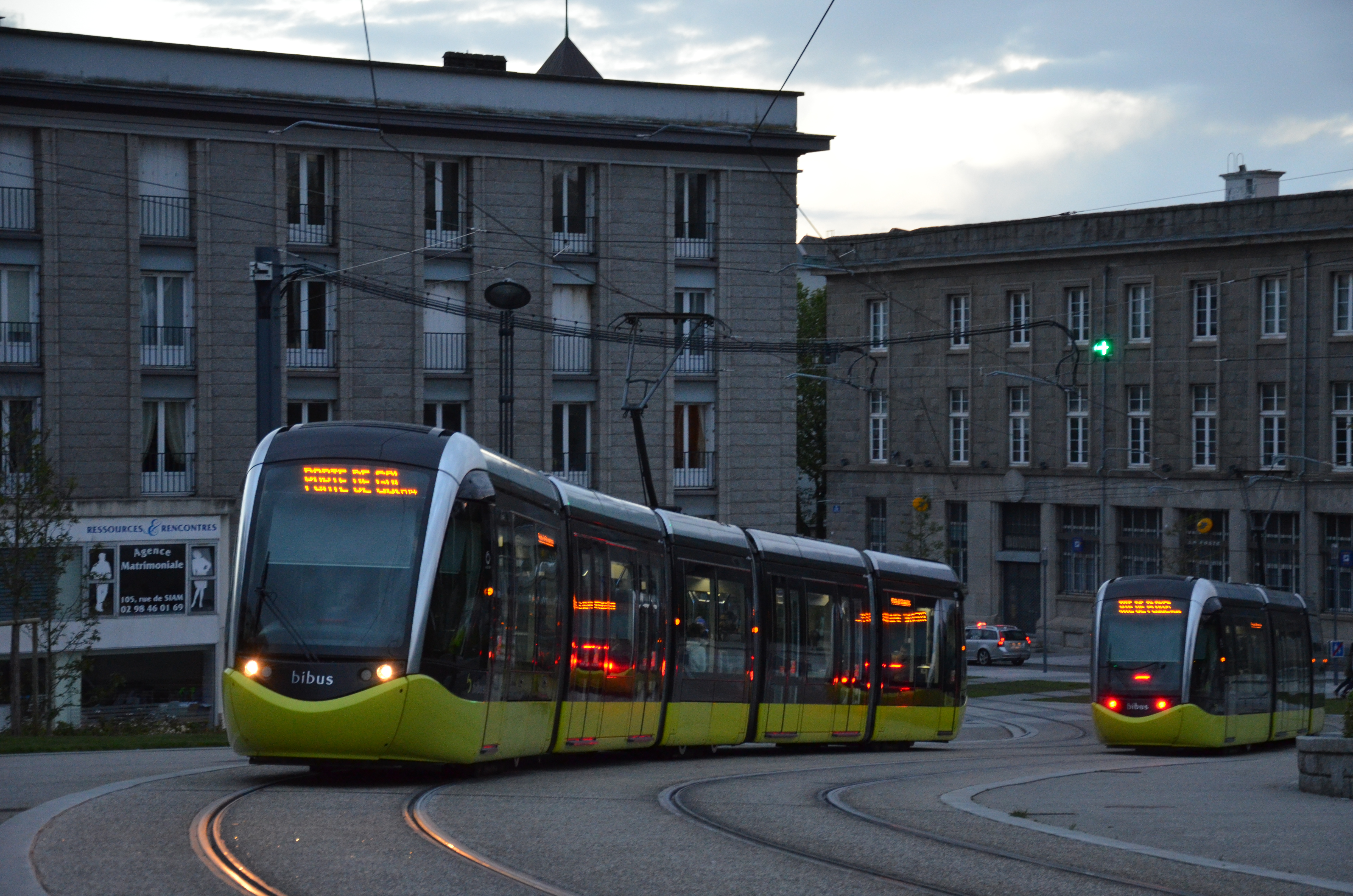 Croisement de rames Alstom Citadis 302 n°1001 + 1016 près de la station Liberté, sur le réseau Bibus de Brest.